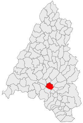 Categorie:Hărţi ale judeţului Bihor